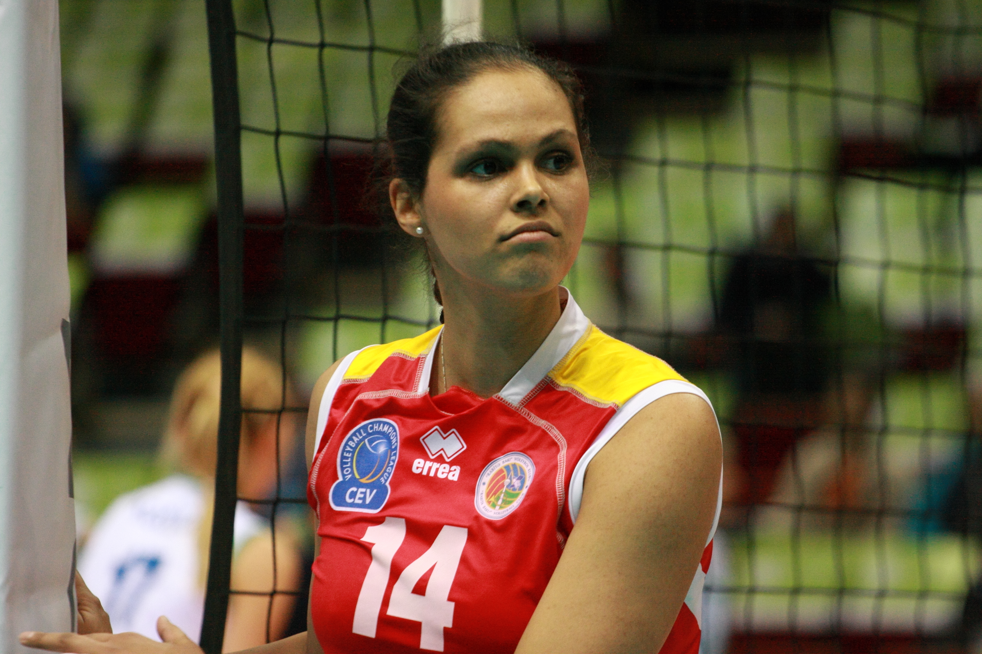 Atom Trefl Sopot vs Rabita Baku